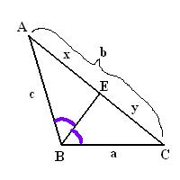 Angle bisector